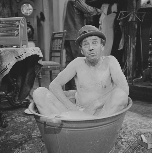 Rien van Nunen tijdens de opnamen van aflevering 10: Kostgangers gevraagd van Stiefbeen en zoon.